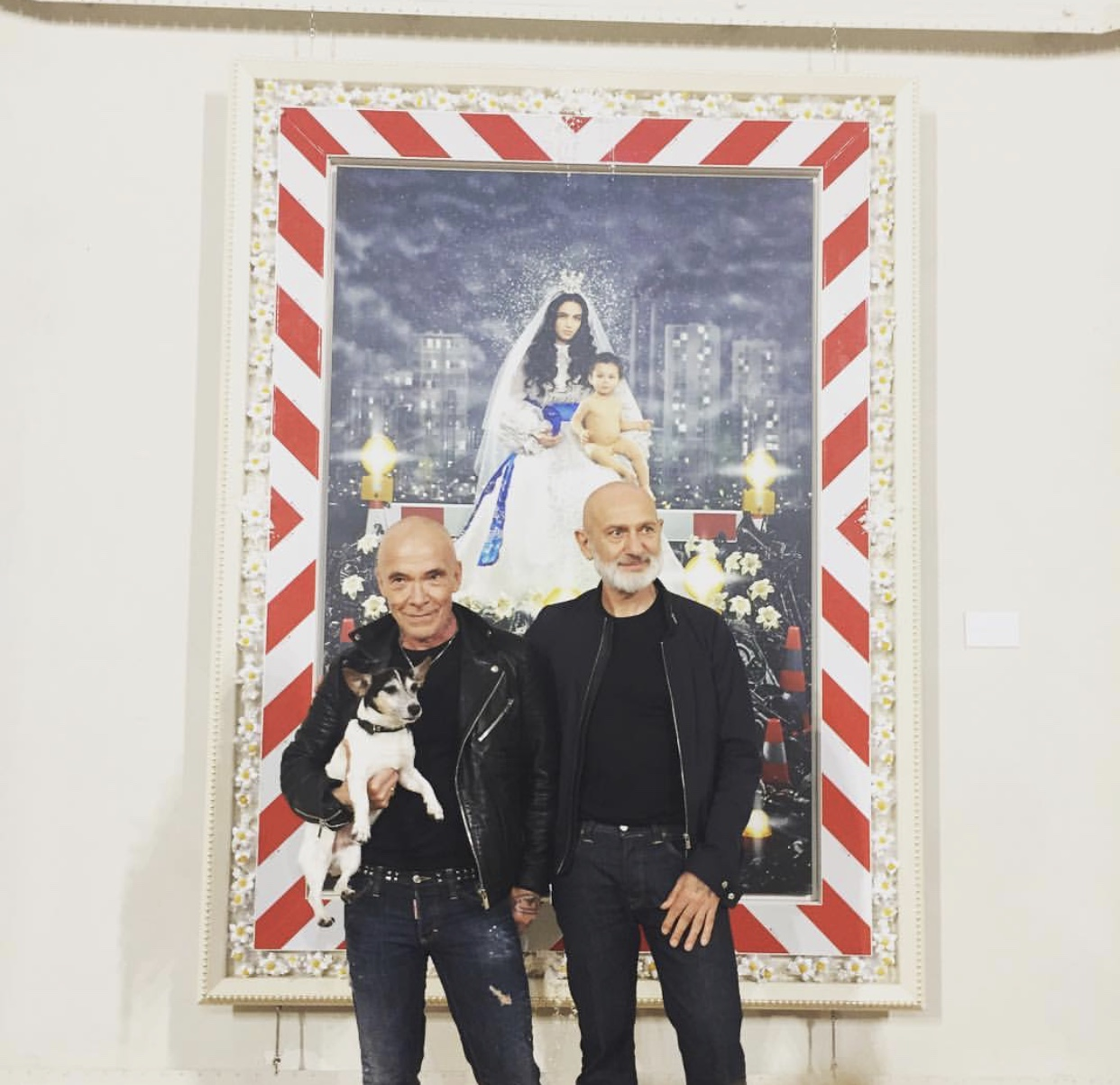 Pierre et Gilles lors du vernissage de leur exposition "Le Génie du Christianisme", dans le cadre du Festival International du Livre d'Art et du Film. Perpignan, juin 2018.